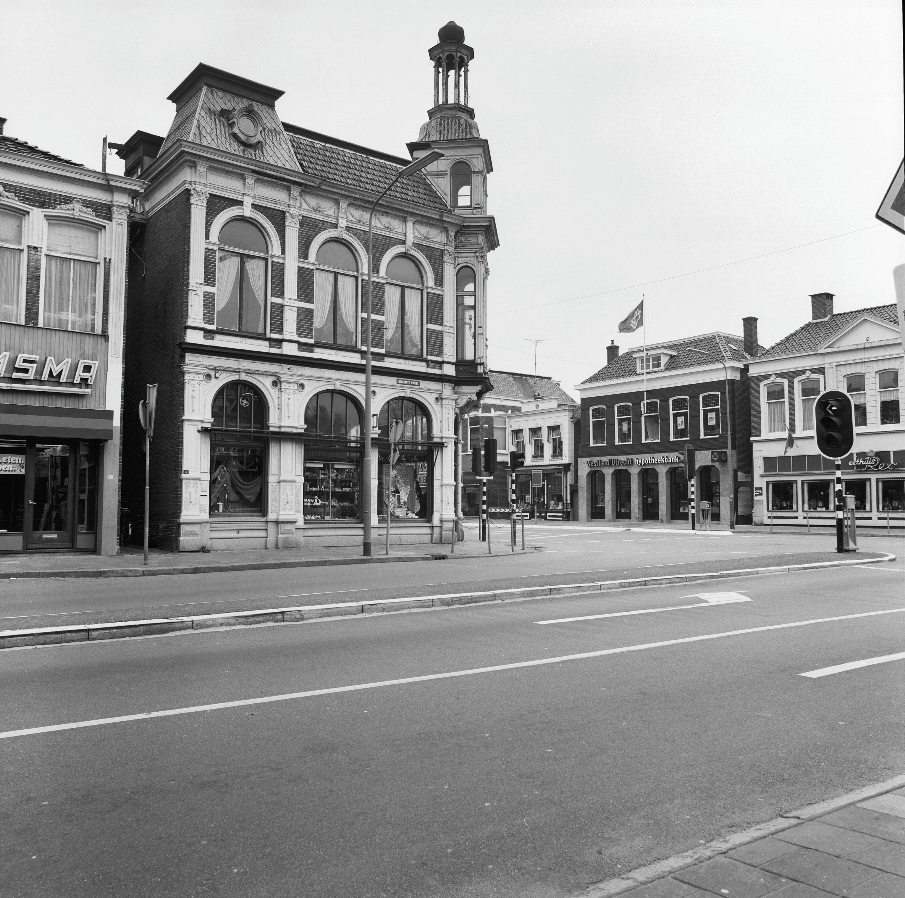 voorgevel